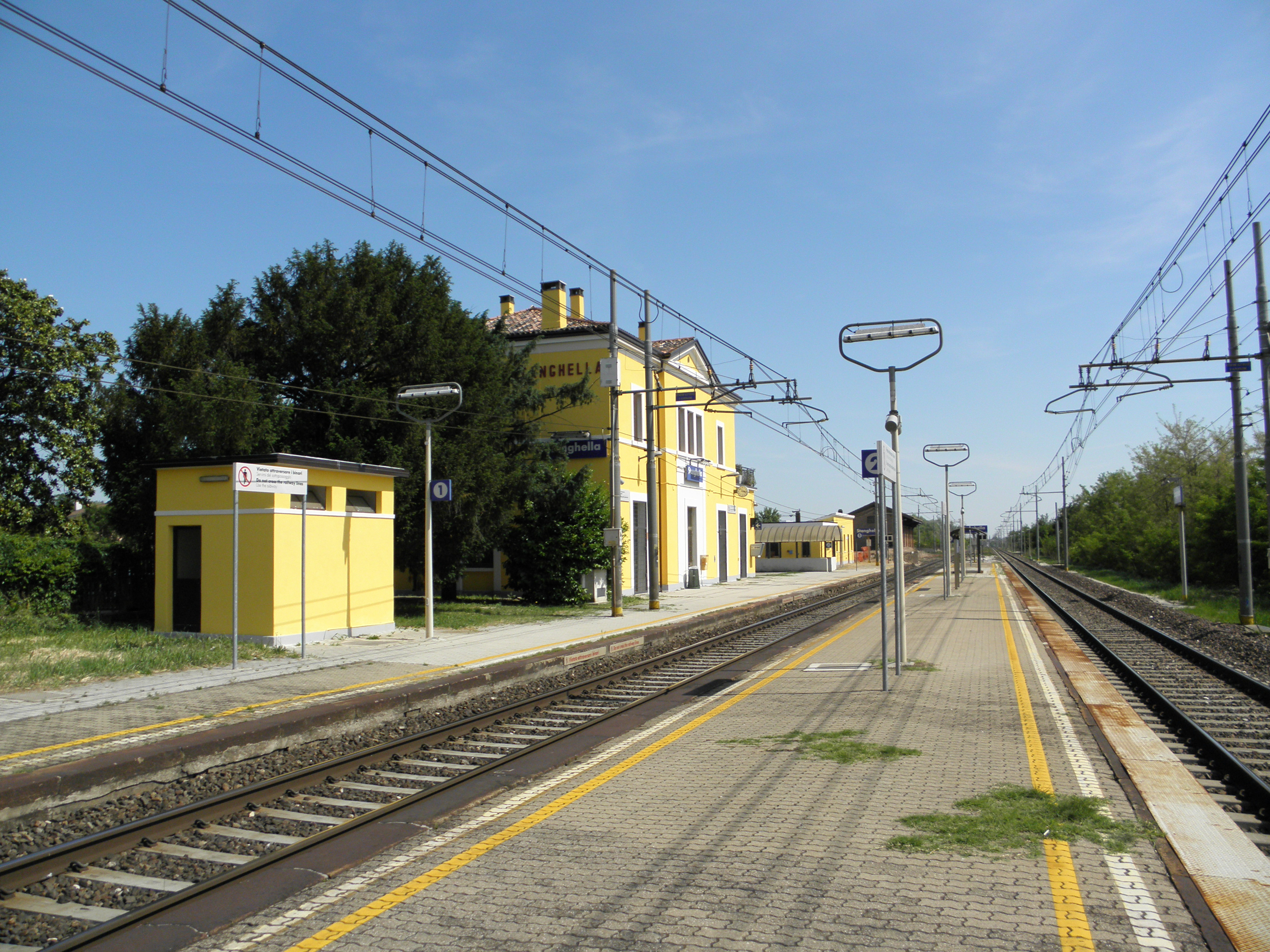 Stanghella: il fabbricato viaggiatori della stazione ferroviaria, lato piazzale del ferro.